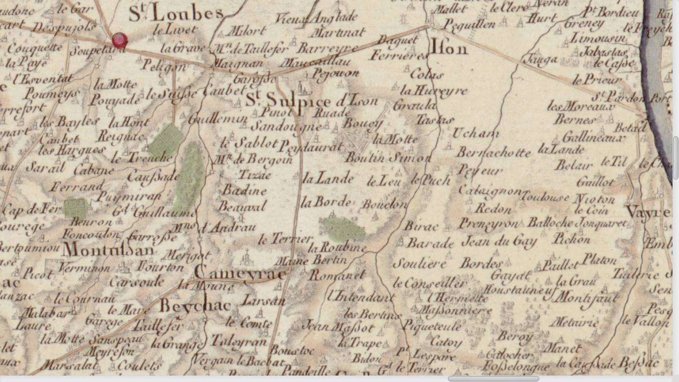 Carte de Cassini n°104, 1756 : zoom sur Saint-Sulpice-et-Cameyrac.